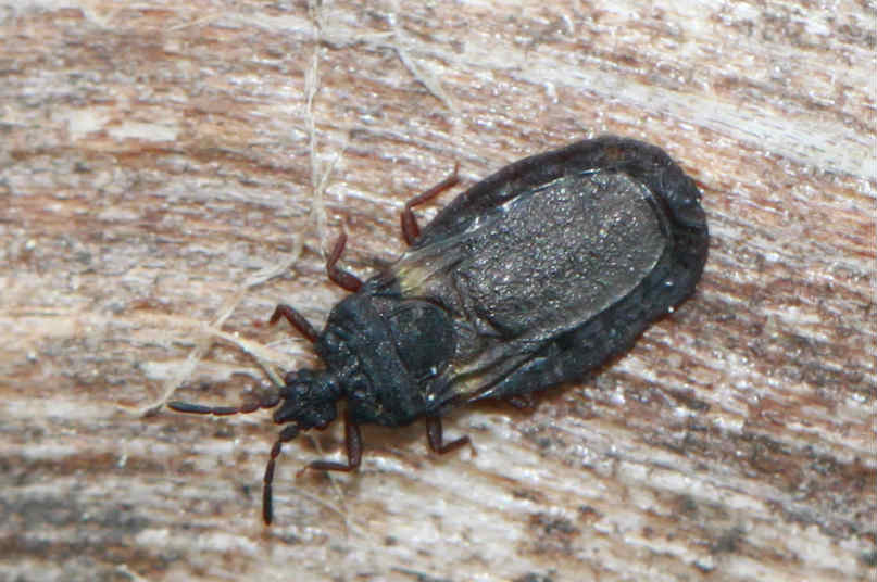 Rindenwanze, Aneurus avenius oder Aneurus laevis, am 11.5.2017 in der Schwetzinger Hardt